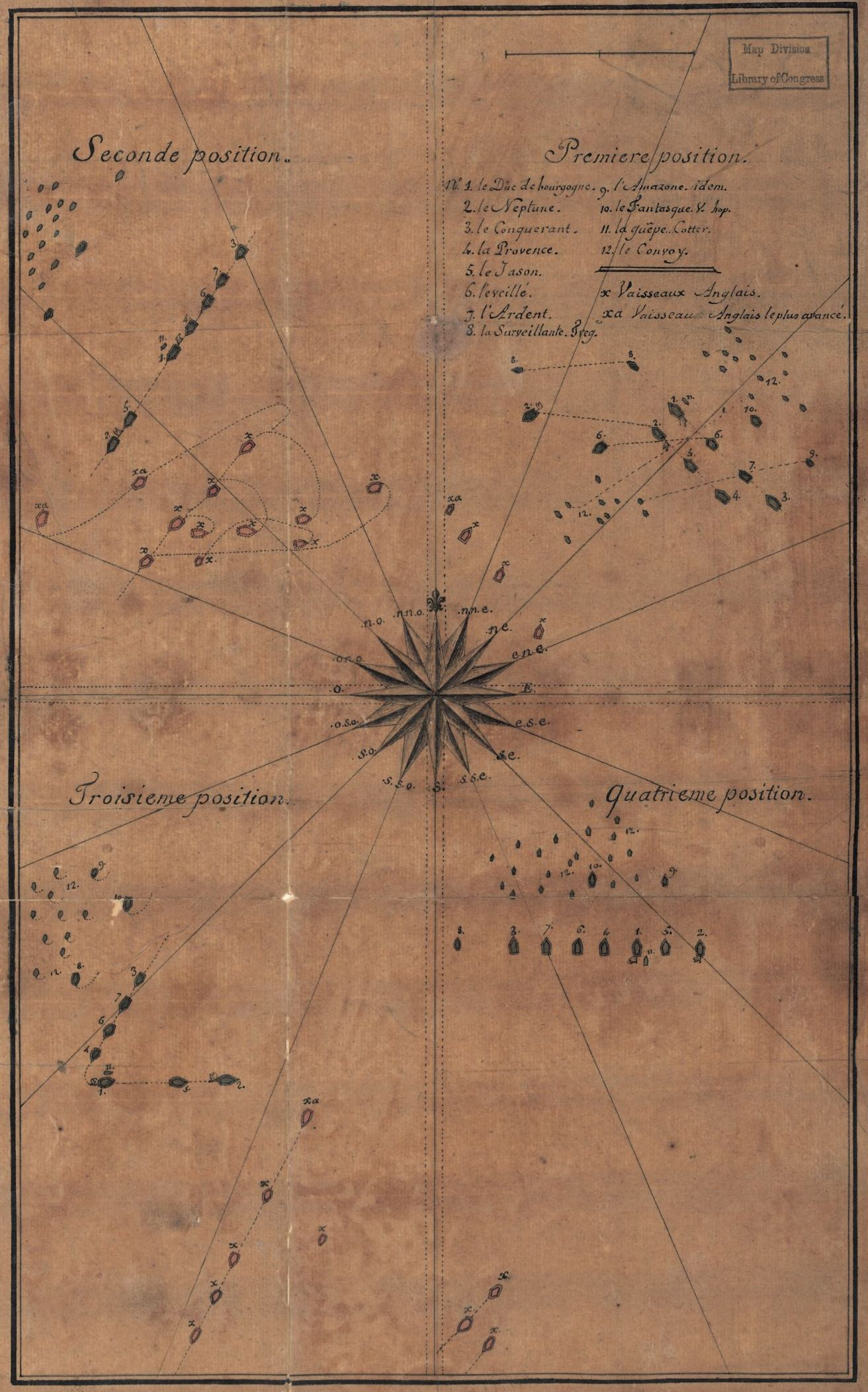 Carte décrivant les quatre positions du convoi de Ternay (escorte et transports) en 1780 face à la tentative d'interception anglaise lors de sa traversée de l'Atlantique pour apporter les renforts de l'armée Rochambeau.